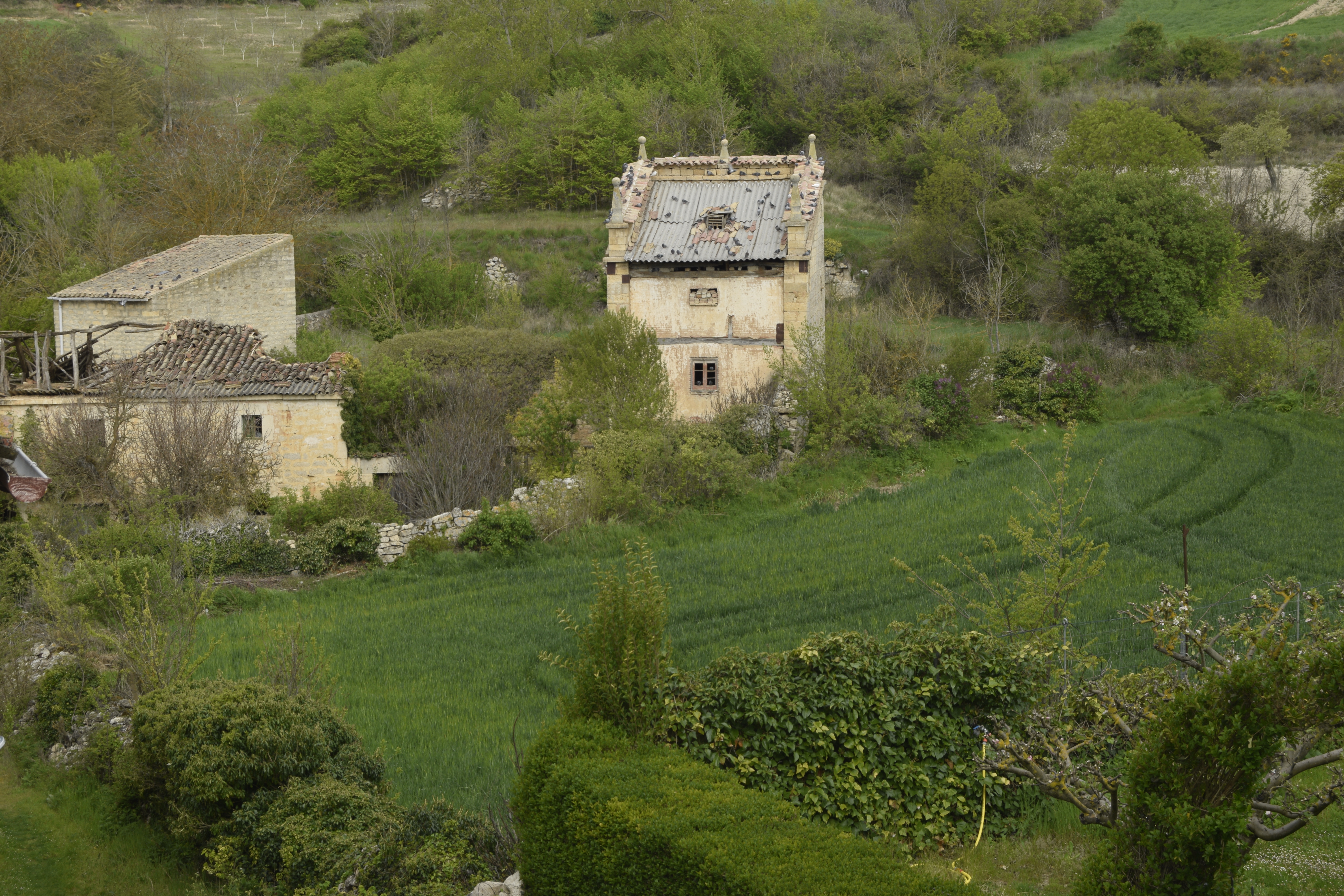 Vista de un palomar en la localidad de Manciles, provincia de Burgos, España.